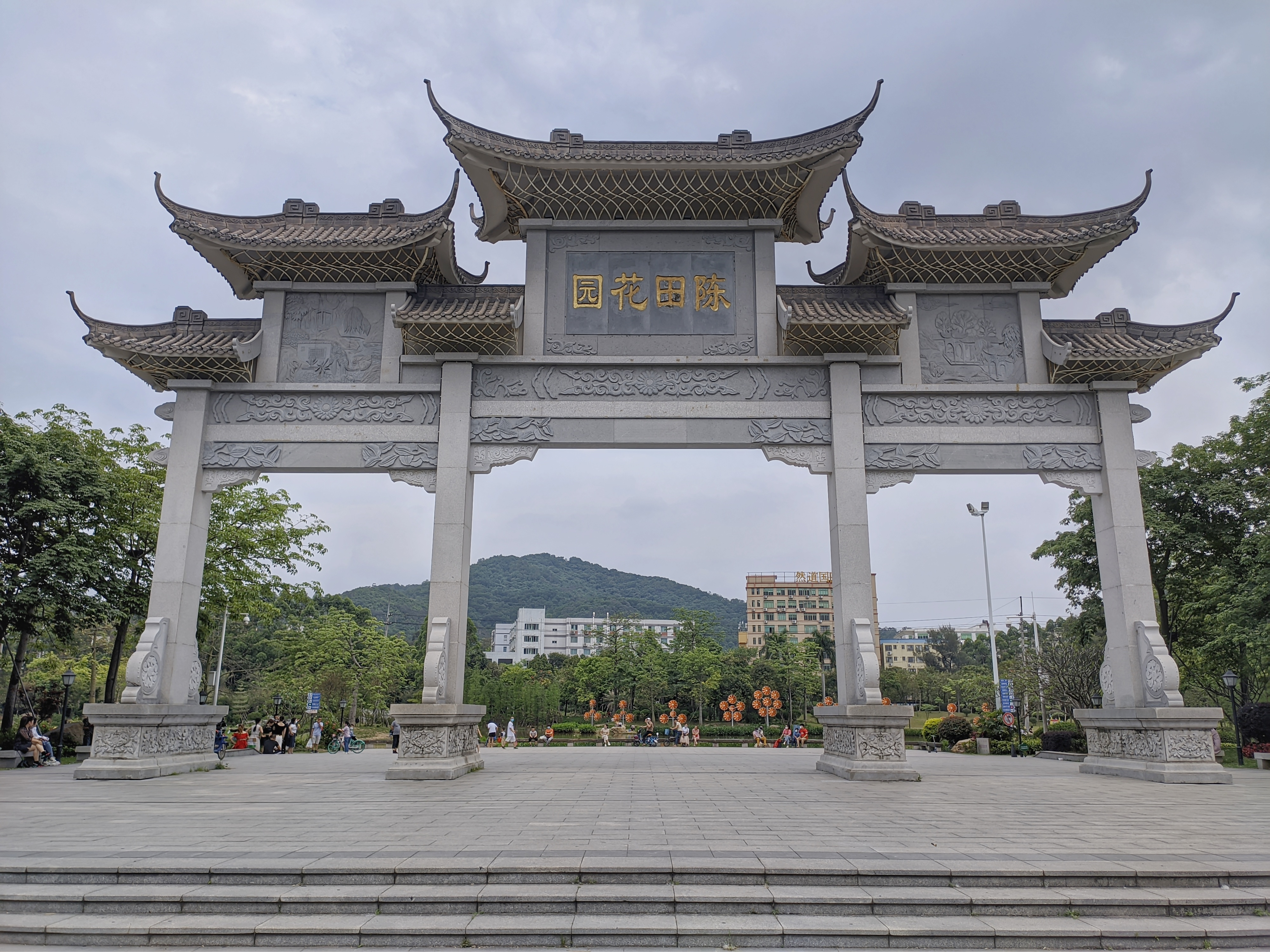 陳田花園之大門 粵語: 陳田花園嘅大門